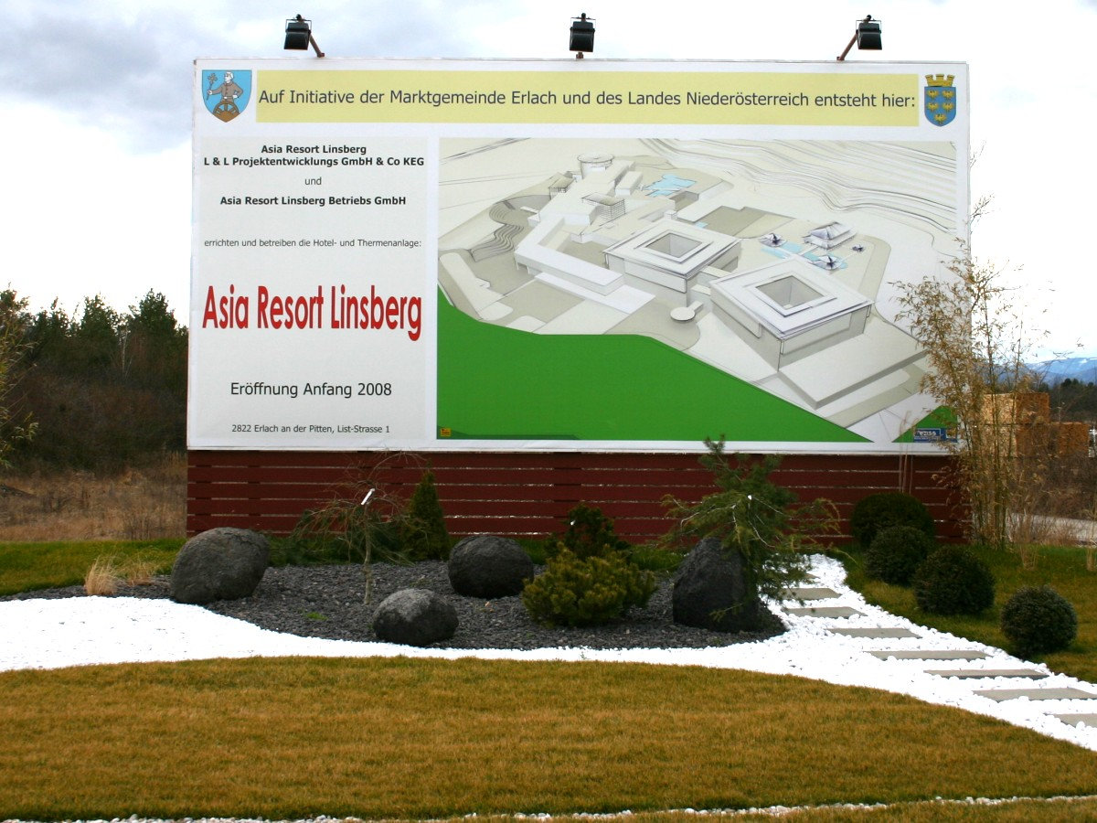 Erlach (Niederösterreich) Thermenbaustelle Linsberg Projekttafel